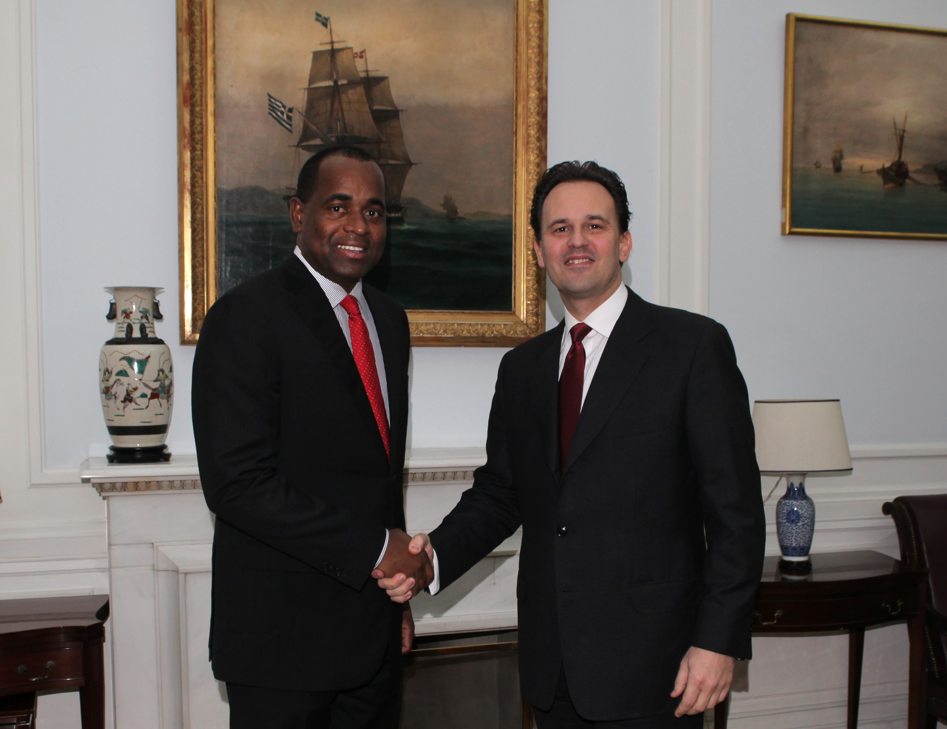 Στις 17 Ιανουαρίου, ο Υπουργός Εξωτερικών Δ. Δρούτσας συναντήθηκε με τον Πρωθυπουργό της Ντομίνικα κ. Roosvelt Skerrit. On January 17th, the Minister for Foreign Affairs Mr. D. Droutsaw met with the Prime Minister of Dominica Mr Roosvelt Skerrit.